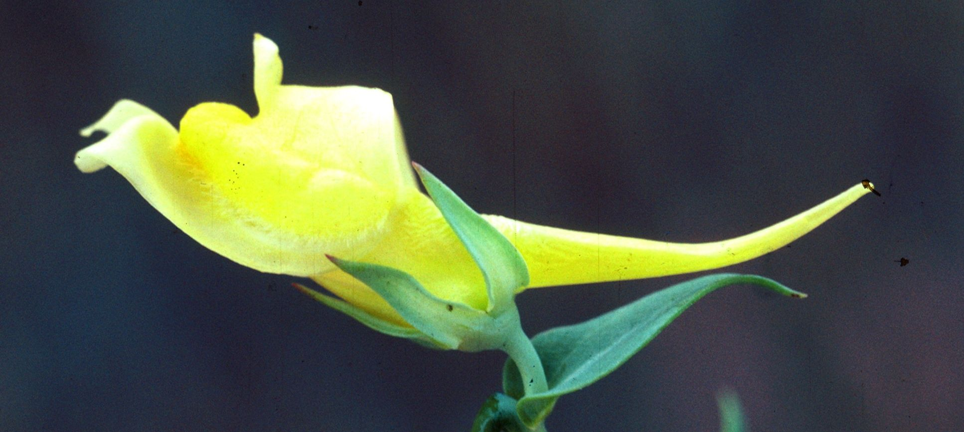 Linaria dalmatica